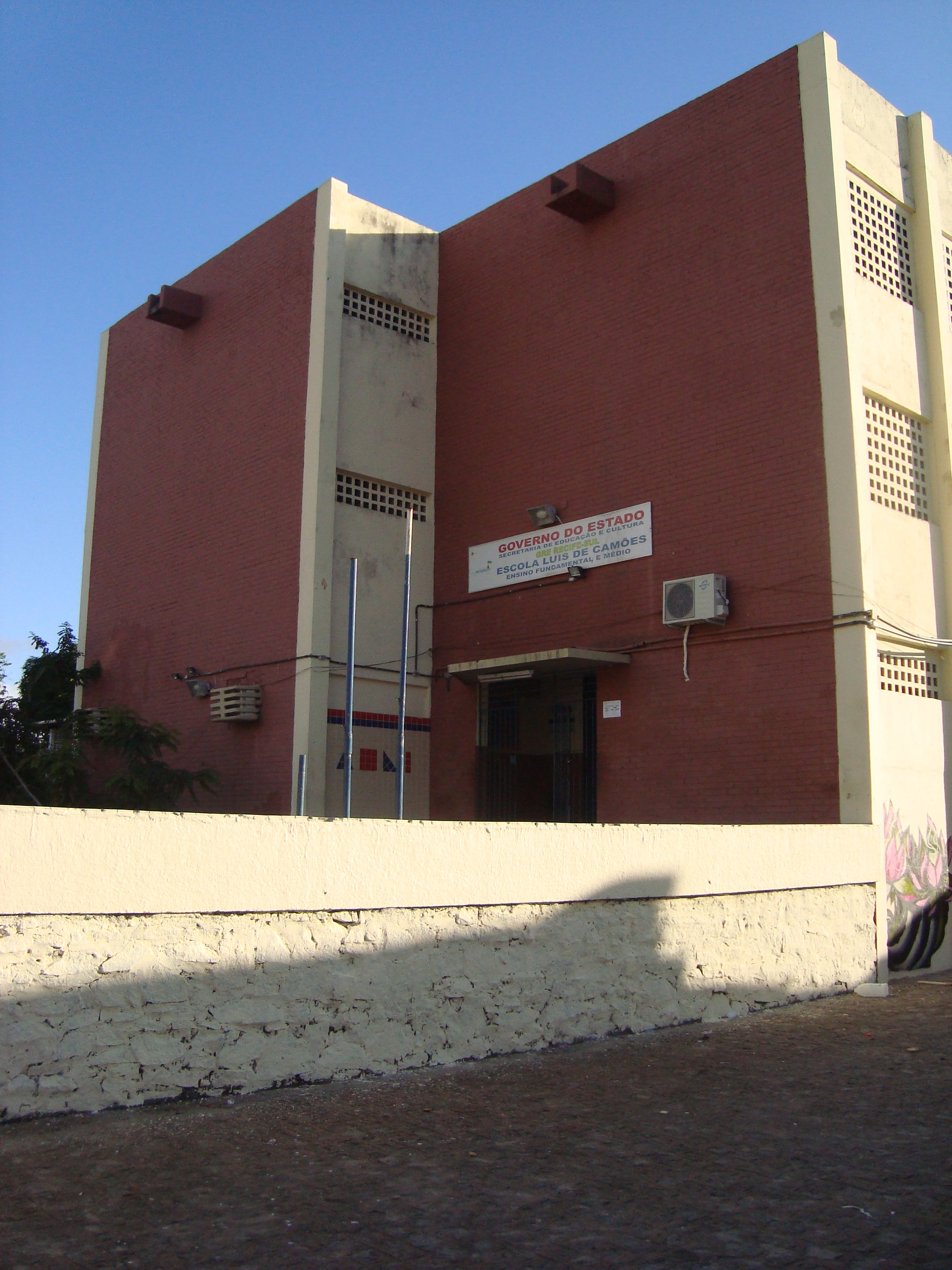 Vista Lateral da Escola Estadual Luís de Camões, situada à Rua Doutor Henrique Lins, s/nº Brasília Teimosa, Recife-PE